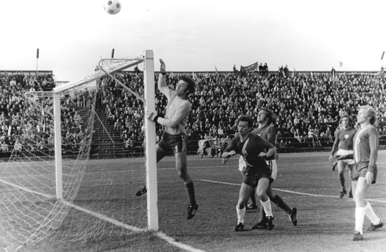 ADN-ZB-Kutscher 28.9.74 Berlin: Oberliga-Meisterschaftsspiel BFC Dynamo - FC Hansa Rostock 0:0 - Angriff der Rostocker Mannschaft auf das Berliner Tor in der 1. Halbzeit. Der Berliner Torwart Lihsa wehrte den Angriff ab.